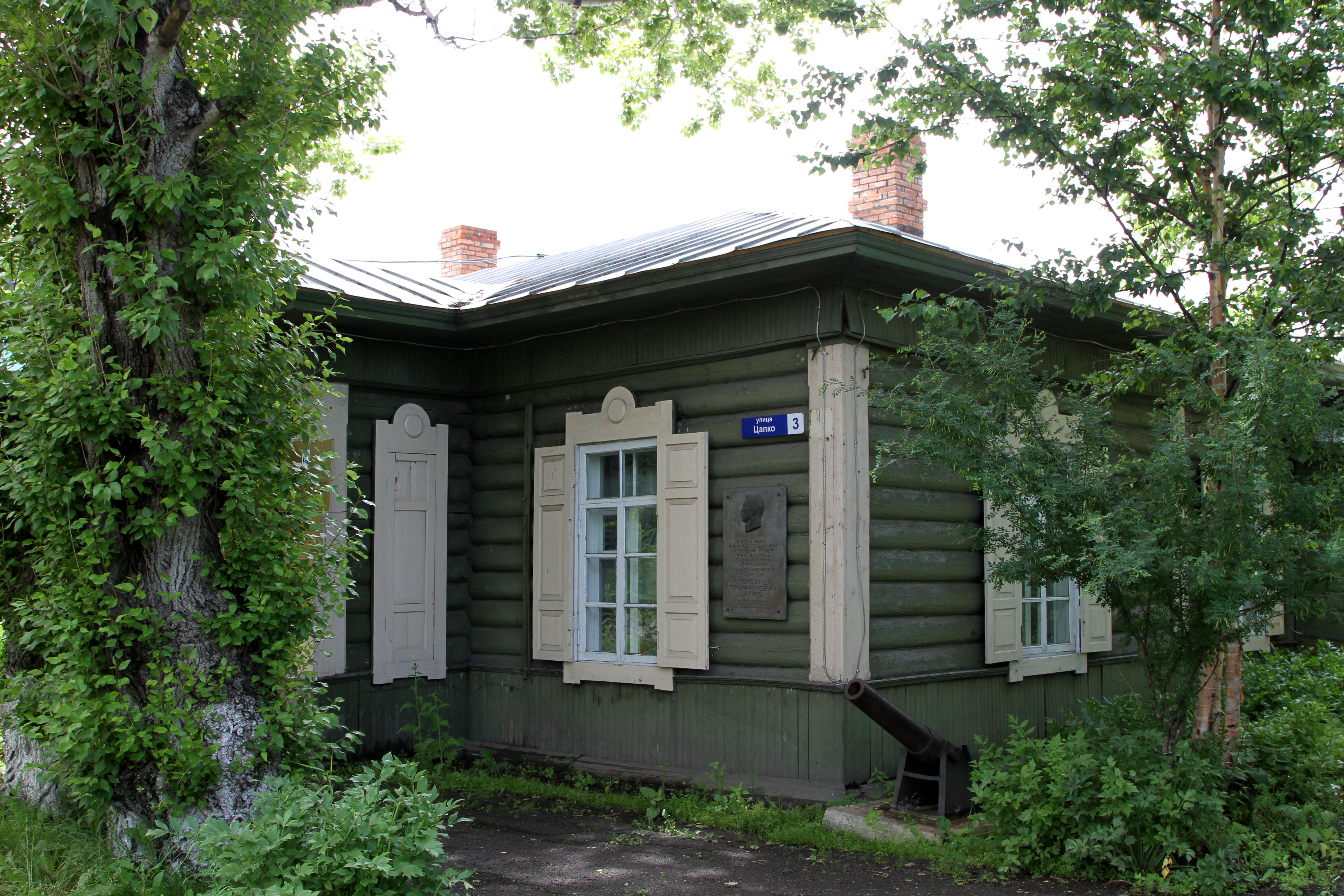 Дом, в котором жил председатель первого сахалинского островного революционного комитета, член ВЦИК РСФСР А.Т. Цапко: улица Цапко, 3, Александровск-Сахалинский, Александровск-Сахалинский район, Сахалинская область